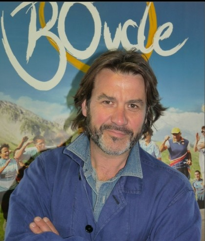 Laurent Tuel Mai 2013